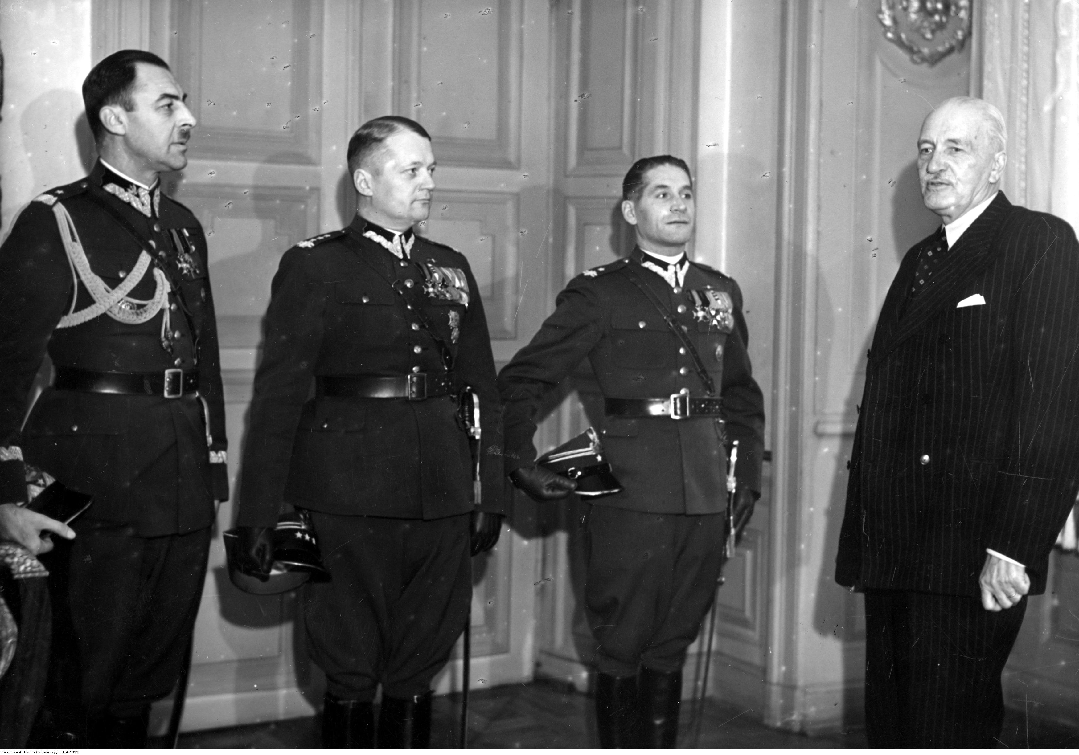 Prezydent Ignacy Mościcki (1. z prawej) w otoczeniu szefa Gabinetu Wojskowego Prezydenta RP generała Kazimierza Schallego (1. z lewej), zastępcy szefa Gabinetu Wojskowego Prezydenta RP pułkownika Józefa Kobyłeckiego (2. z lewej) i dowódcy Oddziału Zamkowego majora Stefana Fabiszewskiego (3. z lewej); 15 grudzień 1938 r. Koncern Ilustrowany Kurier Codzienny - Archiwum Ilustracji. Sygnatura: 1-A-1333